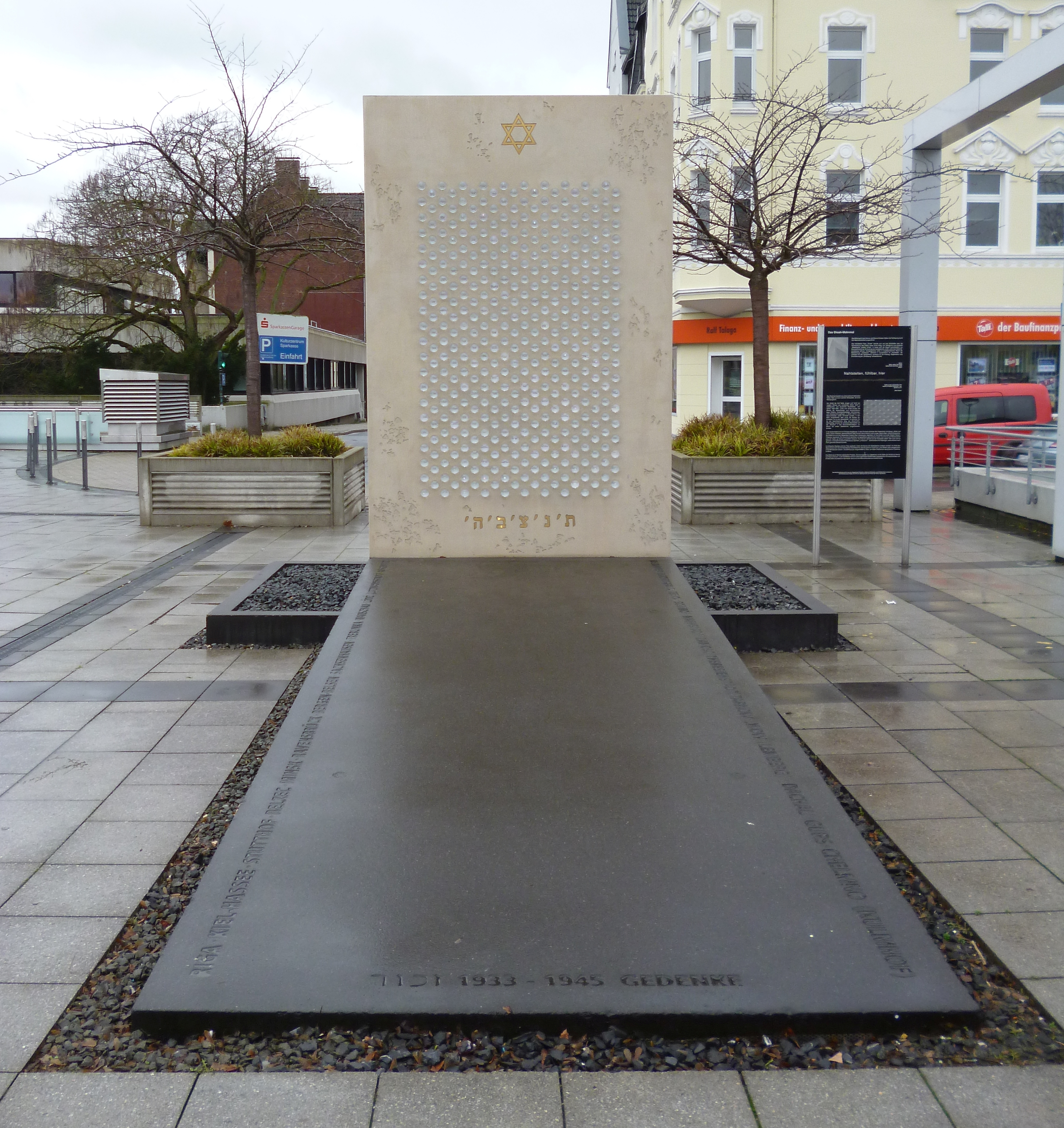 Das 6,5 m lange, 3,25 m breite und 3,5 m hohe Mahnmal mit sondergefertigten Glas-Okularen in einer Betontafel steht auf dem Willi-Pohlmann-Platz zwischen dem Gebäude der Herner Sparkasse und dem Kulturzentrum Herne. Eine dunkle anthrazitfarbene begehbare rampenähnlich aufsteigende Betonplatte führt zu einer aufrecht stehenden 9 cm dünnen hellen Gedenktafel. Darin eingelassen sind 401 Okulare aus Glas mit den Namen sowie Geburts- und Todesdaten und Todesorten der Opfer aus Herne und Wanne-Eickel. Am Anfang der fünf Meter langen Rampe, die auf die Selektionsrampen in den Konzentrationslagern verweist, ist auf hebräisch und deutsch „Gedenke 1933-1945“ eingelassen, an den Längsseiten die Namen von Ghettos und verschiedenen Arbeits-, Konzentrations-, Internierungs- und Vernichtungslagern, in die die Herner und Wanne-Eickeler deportiert oder in denen sie ermordet wurden.